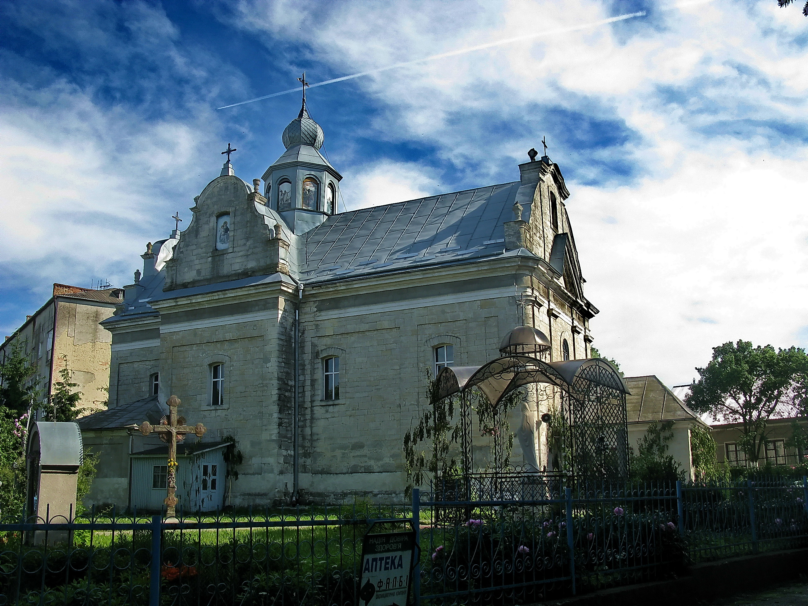 Прокатедральний собор Преображення Господа і Спаса нашого Ісуса Христа (мур.), Зборів